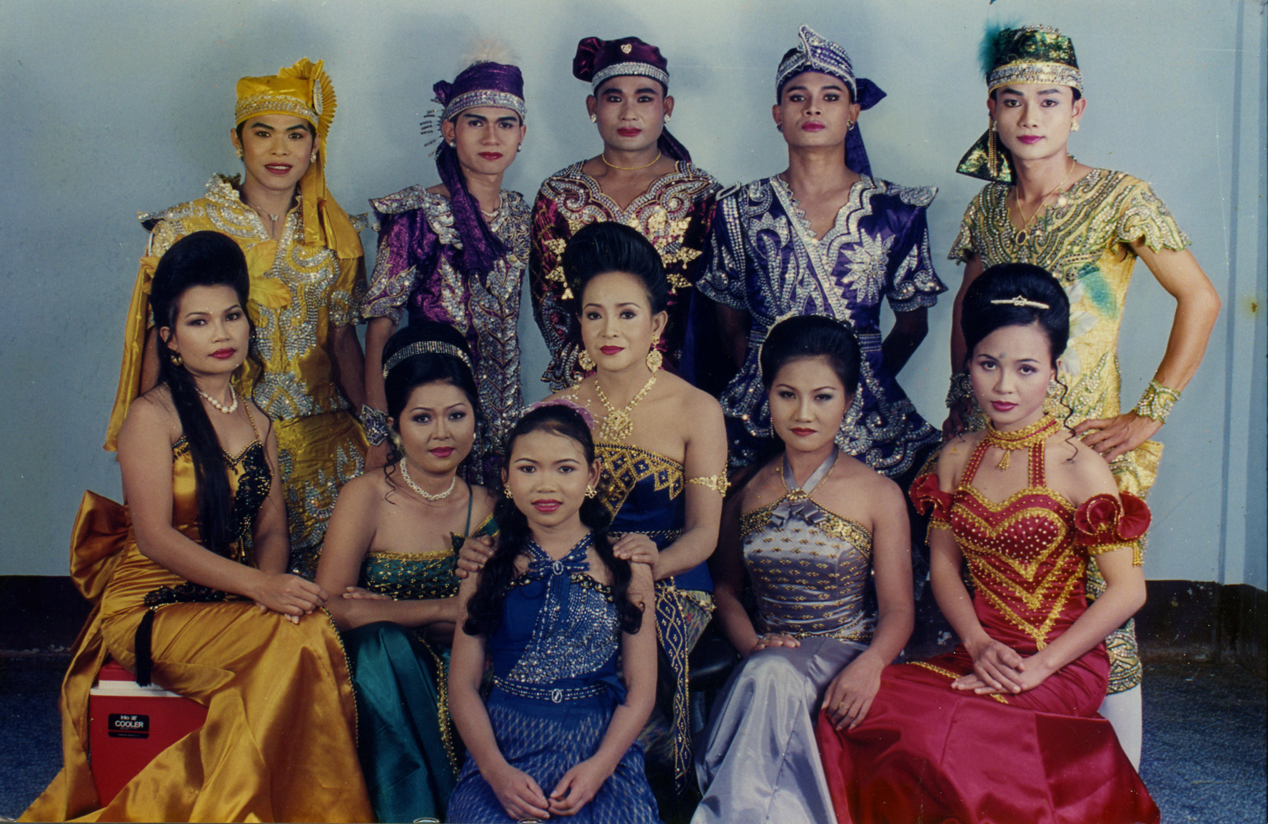 แสงอรุณ บุญยู้